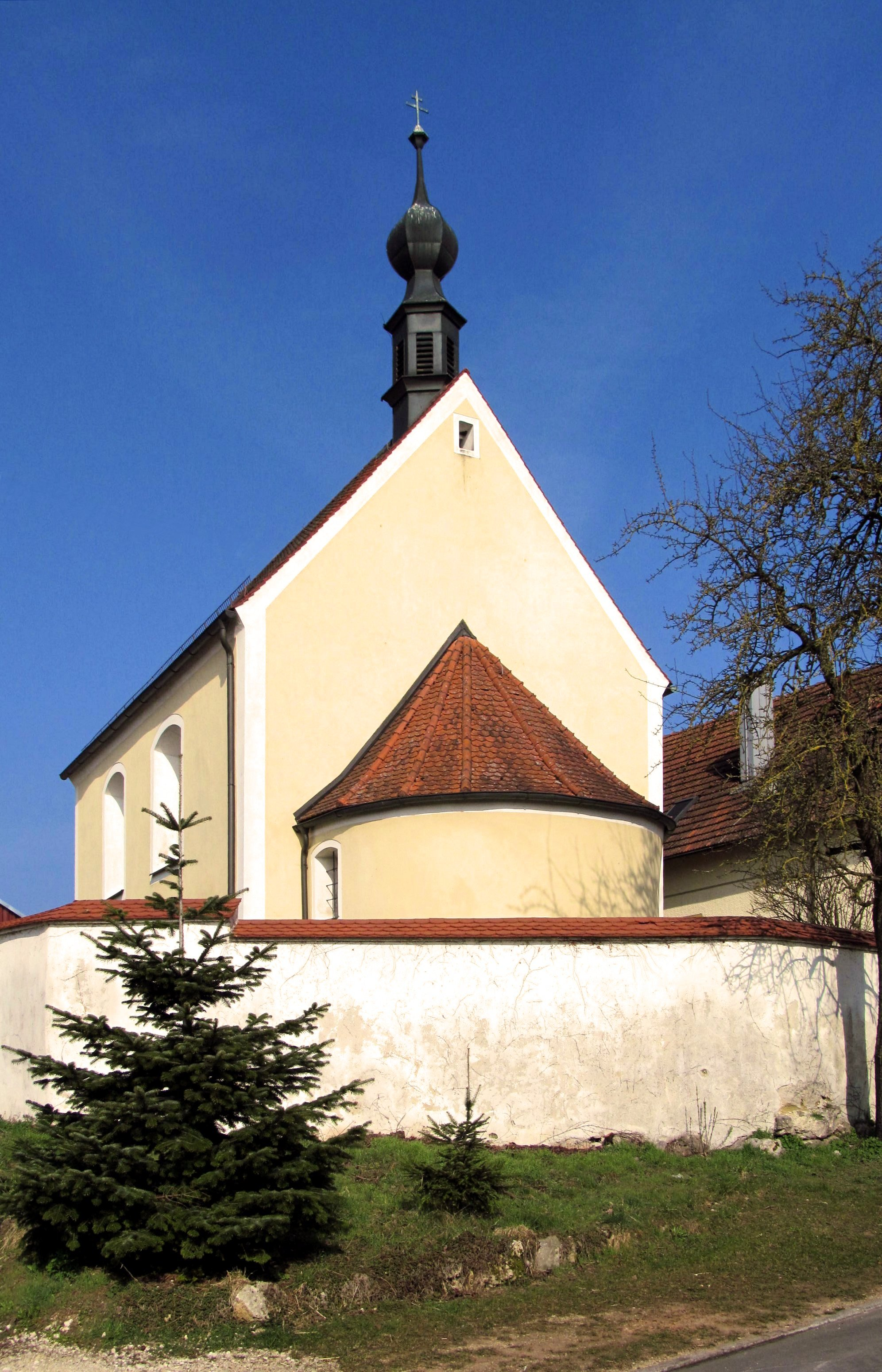 Winbuch: Schlosskapelle und Friedhofsmauer